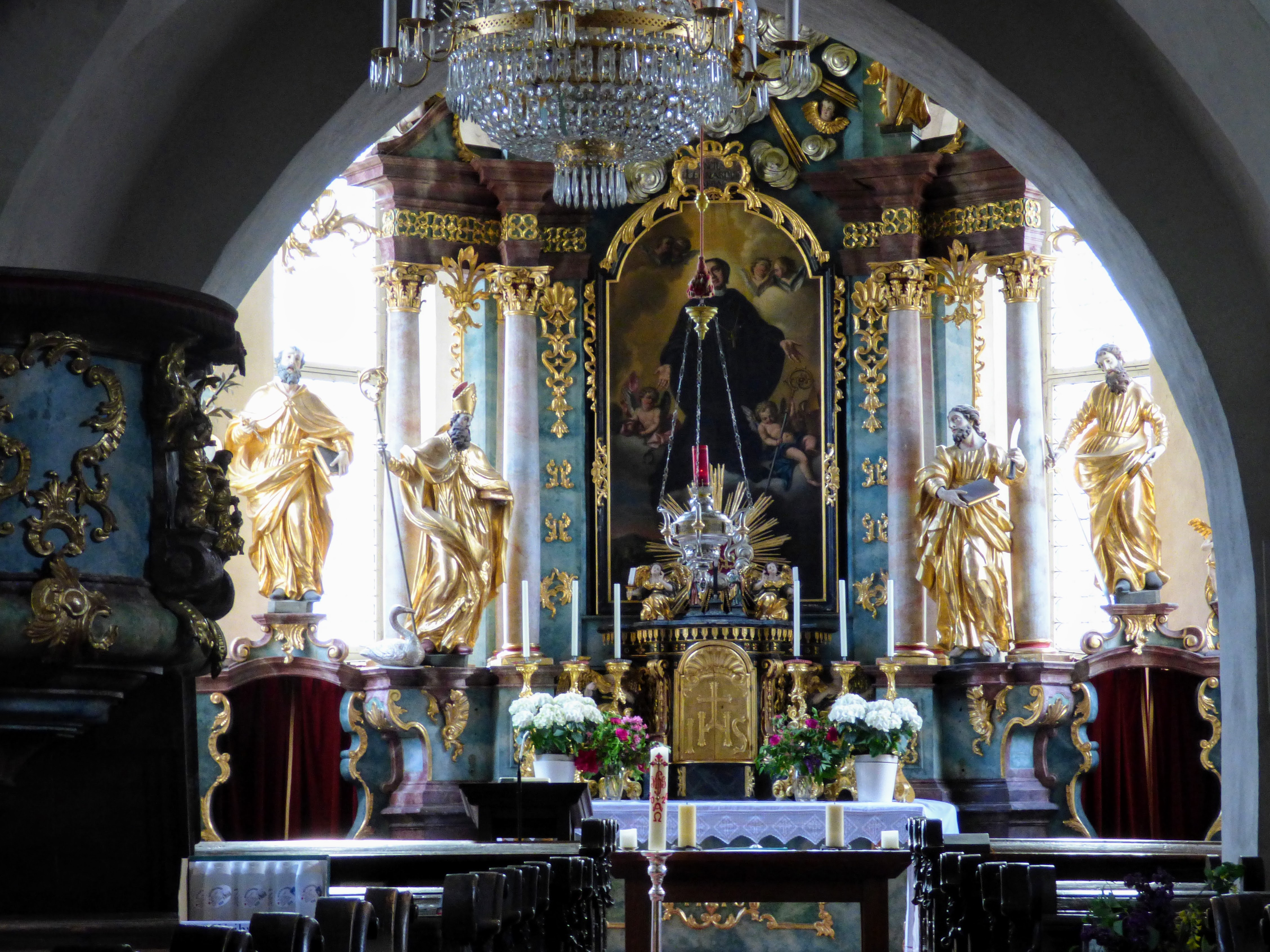 Pfarrkirche hl. Leonhard, Gnesau, Kärnten Blick durchs Schlüsselloch